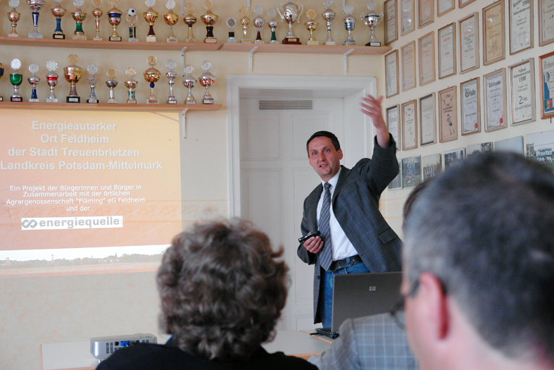 Der Bürgermeister von Treuenbrietzen Michael Knape, erläutert das Konzept des Bioenergiedorfs Feldheim